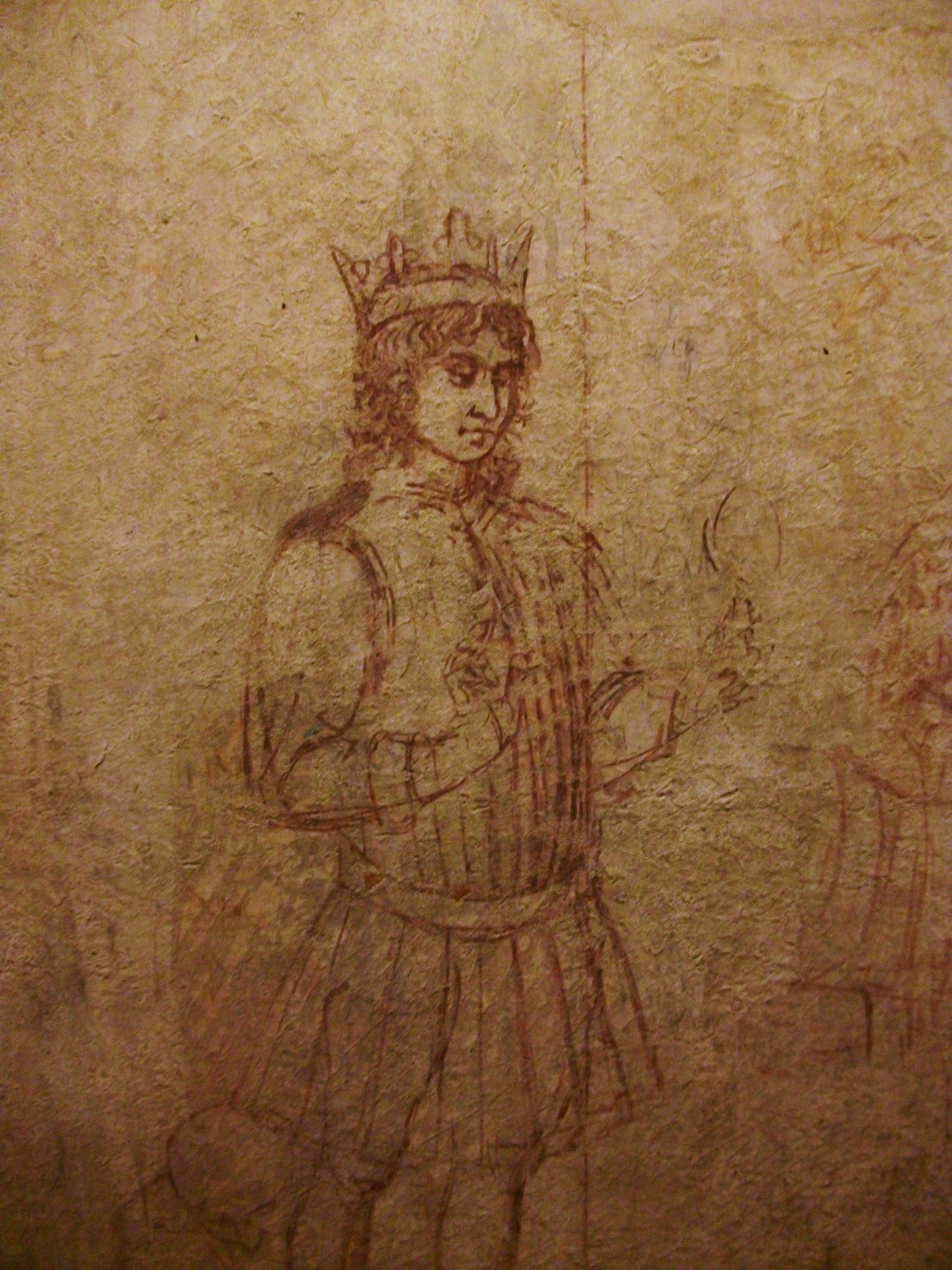 Figura d'un rei al Museu delle Sinopie de Pisa.